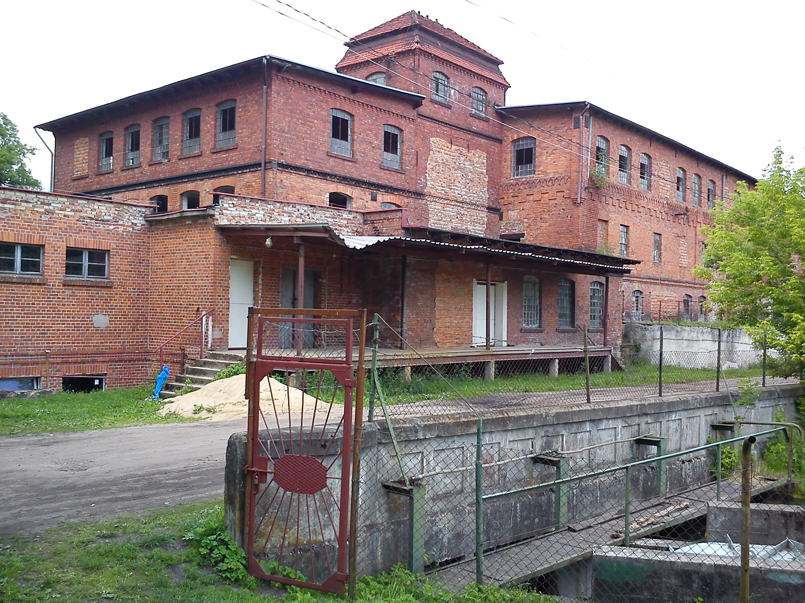 Koziczyn.